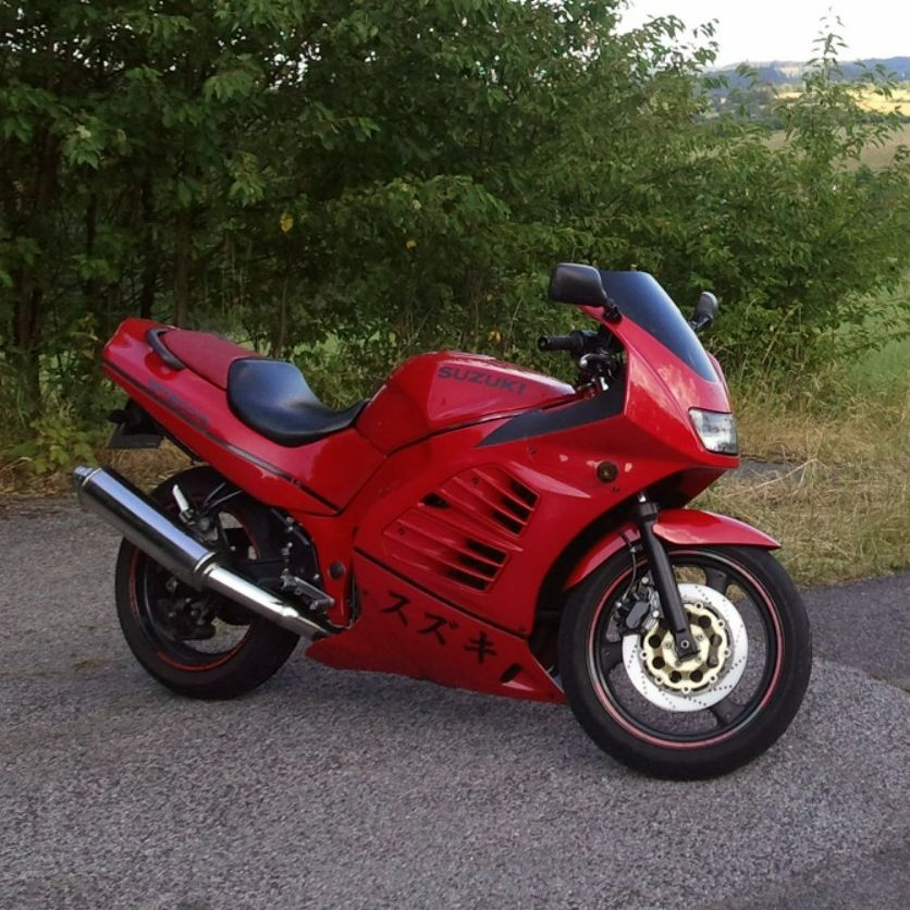 Meine 1993er RF 600R mit einigen Modifkationen